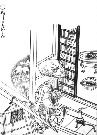 Nurarihyon (ぬらりひょん) from the Gazu Hyakki Yakō (画図百鬼夜行)